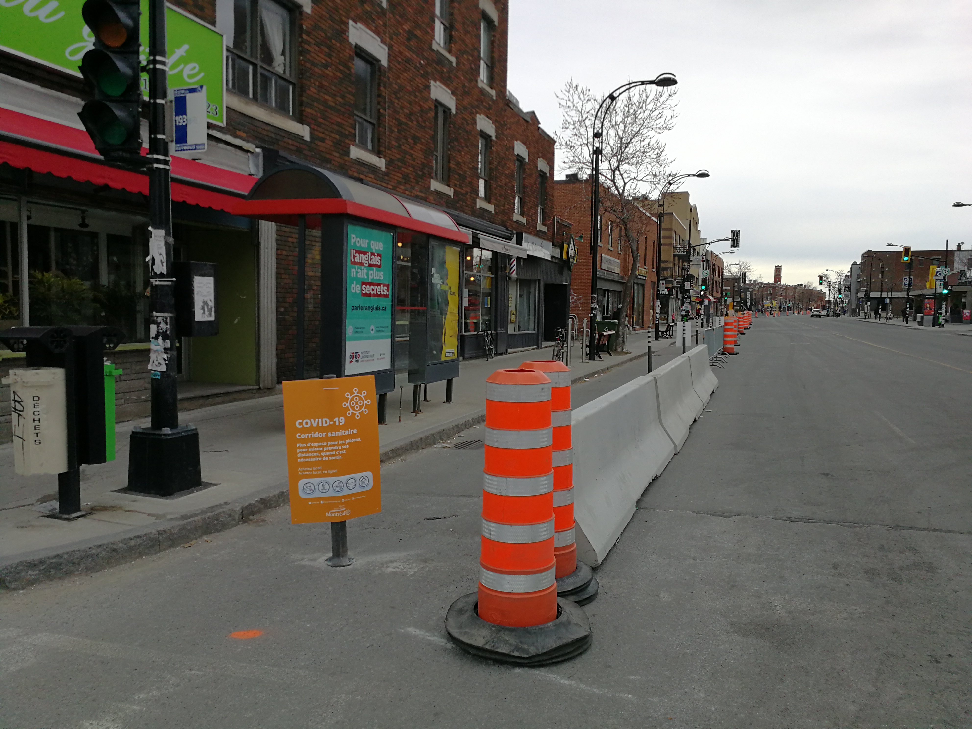 Corridor sanitaire sur la rue Jarry, direction est, au coin Saint-Denis dans le quartier Villeray à Montréal mis en place dans le cadre de la pandémie de Covid-19 au Québec.